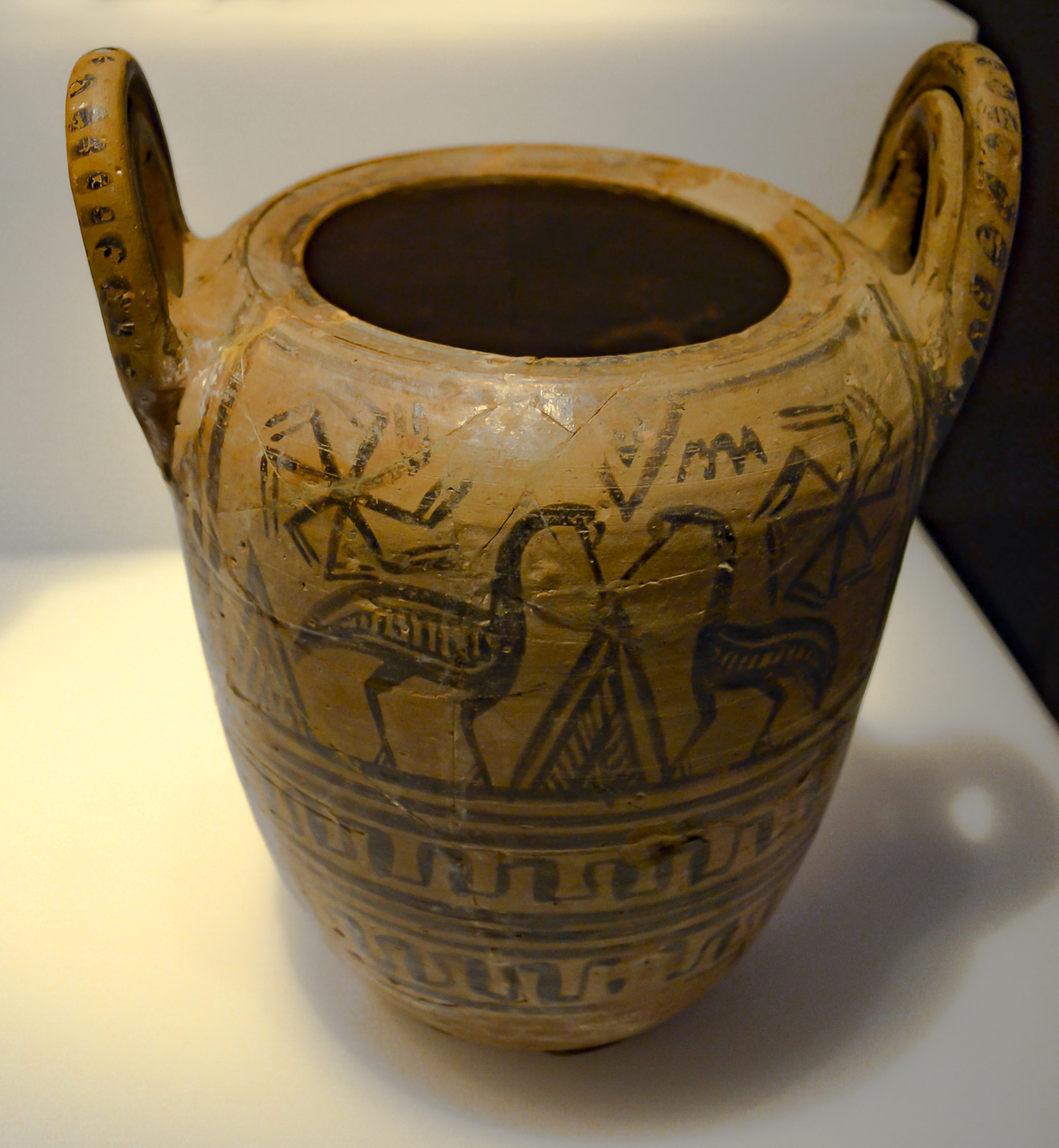 Pixis beocia de época geométrica. En la parte superior del cuerpo hay dos aves zancudas esquematizadas entre triángulos. Encima de las aves figuran dos esvásticas beocias de ocho brazos con los limbos hendidos y la figura de un pez junto al asa. Inmediatamente debajo hay dos bandas horizontales con un motivo de almenas en la parte inferior del vaso. Bajo las asas también hay esvásticas beocias de ocho brazos. Altura = 24 cm; Anchura máxima = 19,50 cm. 710-650 a. C. Nº inv. 19482. Museo Arqueológico Nacional de España.